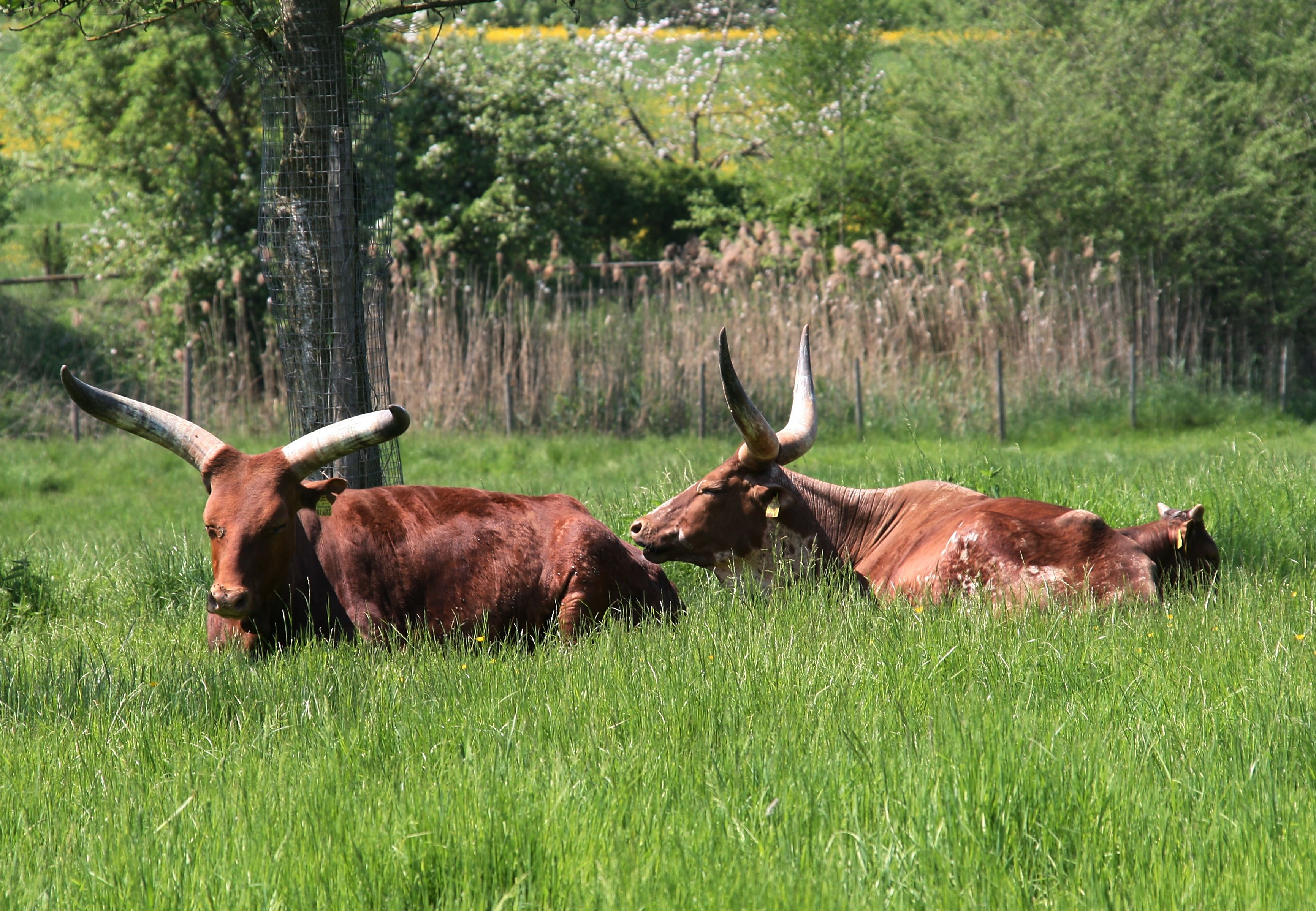 Das Watussirind oder Ankolerind ist eine Hausrindrasse in Ostafrika. Sie entstand durch Kreuzung von Langhornrindern mit Buckelrindern, auch Zebus genannt.